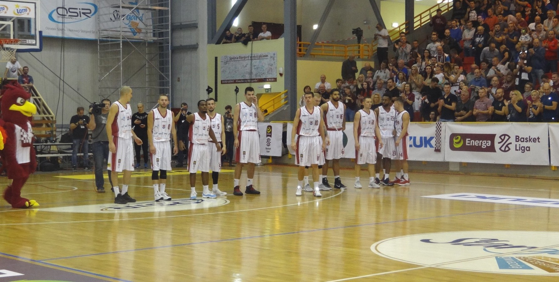 Spójnia Stargar (06.10.2018)